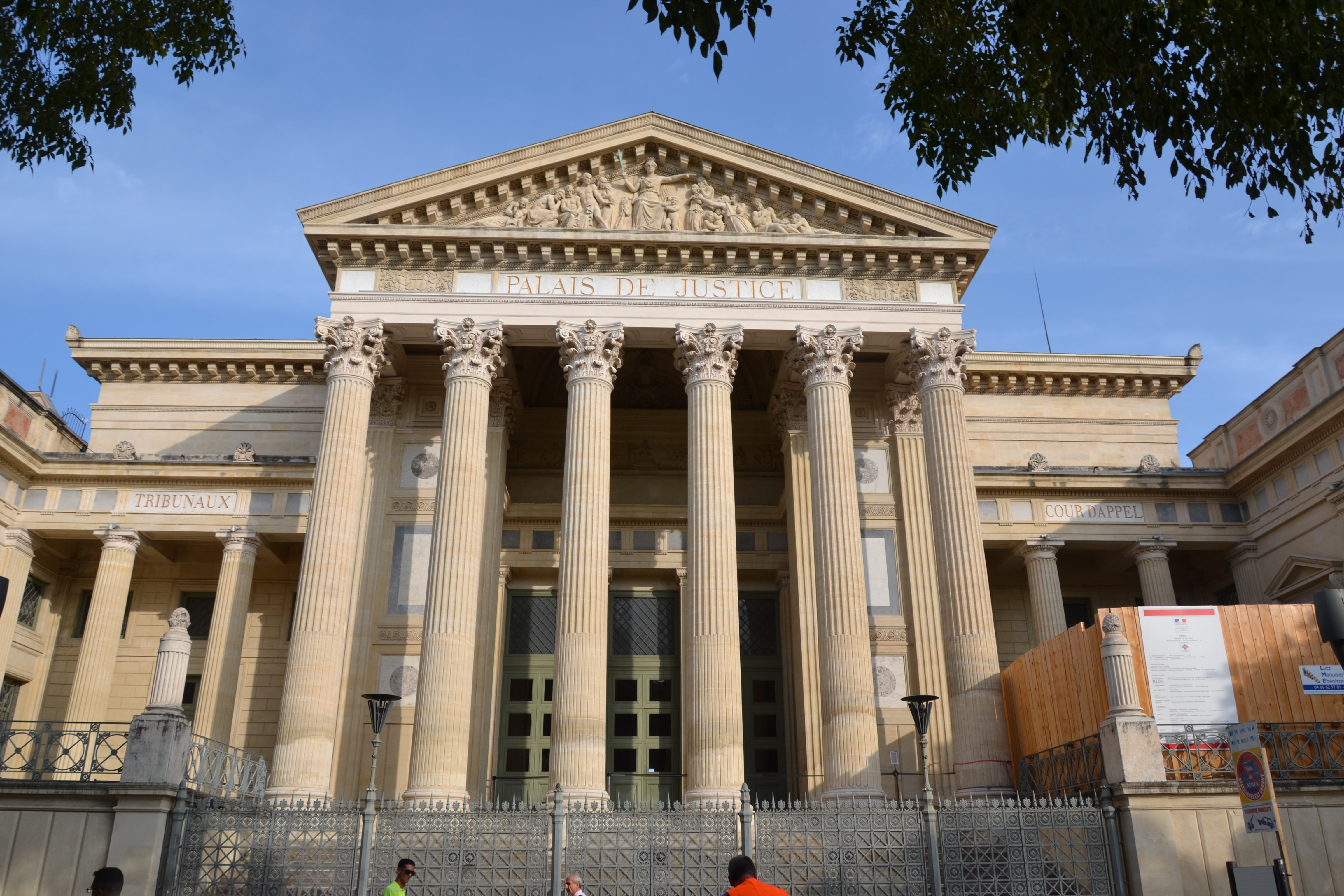 facade du palais de justice de Nîmes .